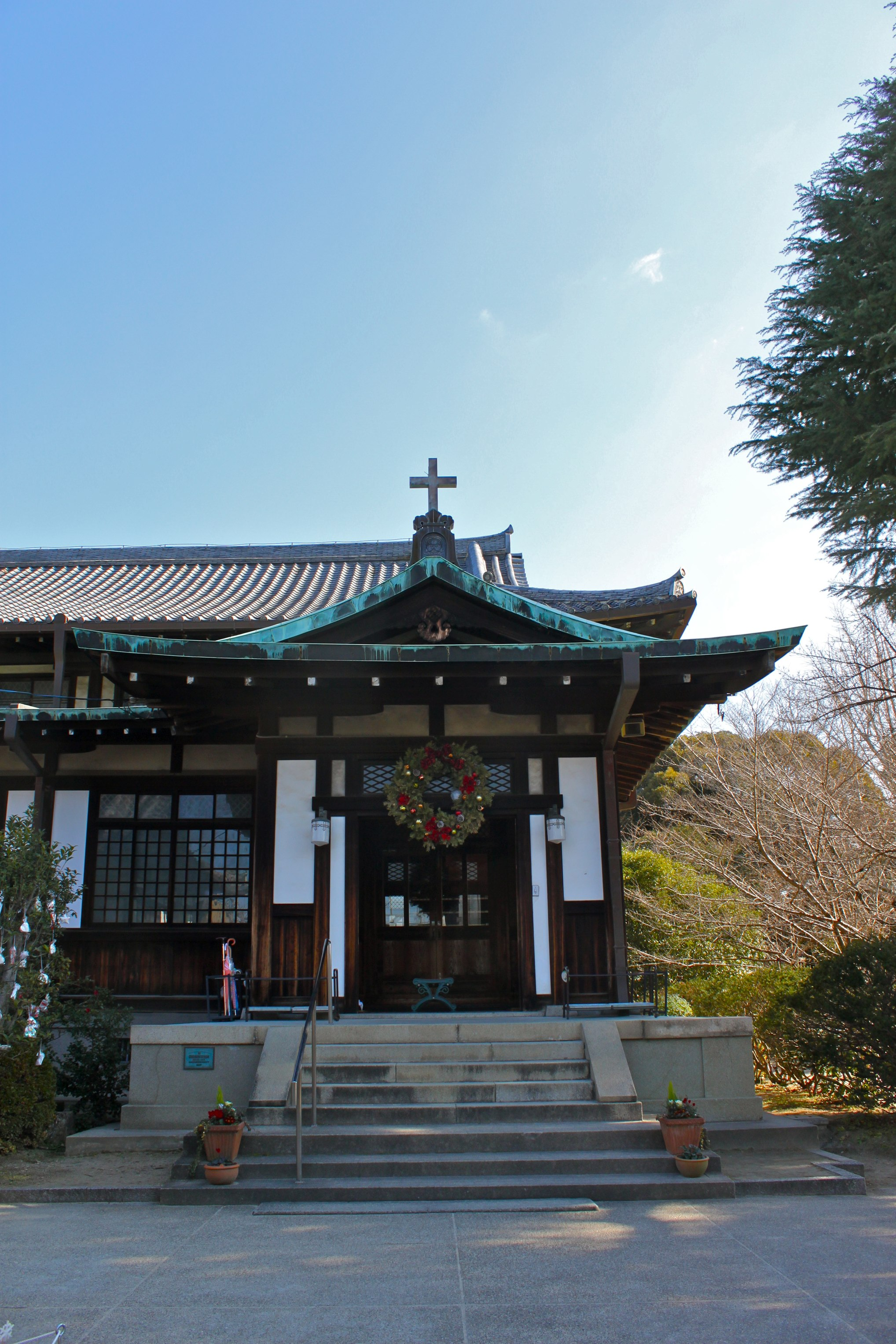 奈良市東向通りの奈良基督教会、2013年のクリスマス前